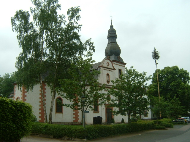 Kirche St Hubertus in Körperich (Eifel), 1570 erwähnt, 1790 neu erbaut